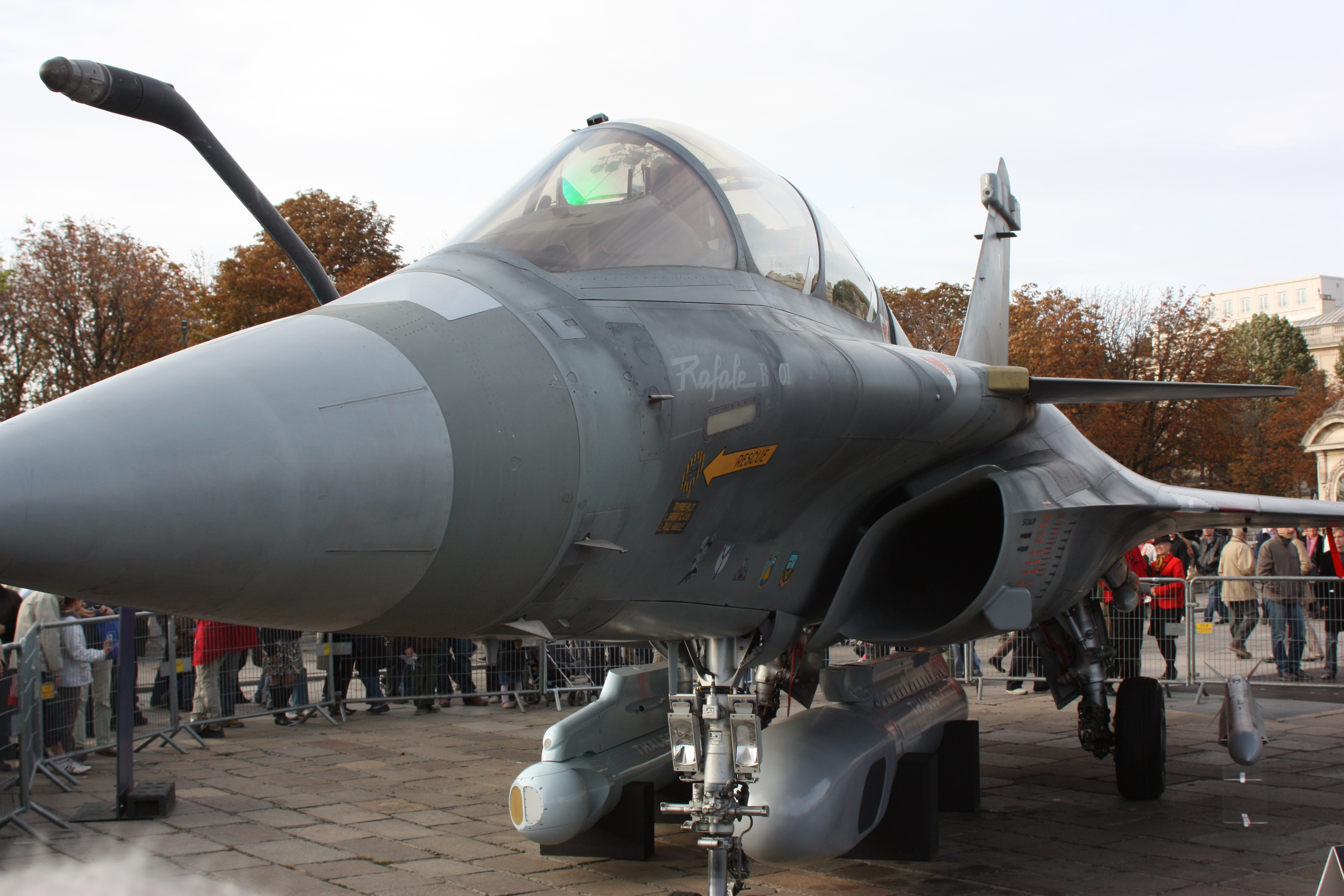 Exposition - Les 100 ans de l'aérospatiale - Paris - 4 Octobre 2008 100 ans d'aéronautique sur les Champs-Élysées.